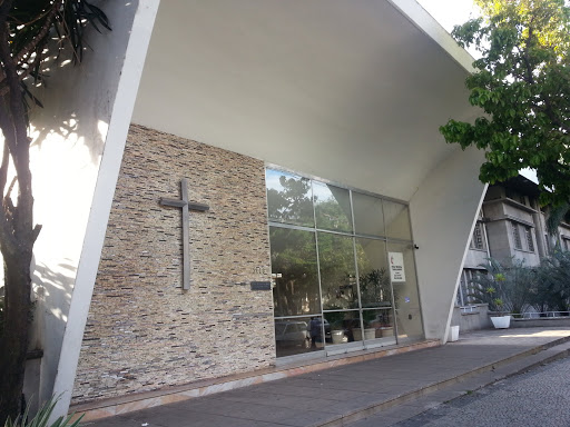 Capela Izabela Hendrix